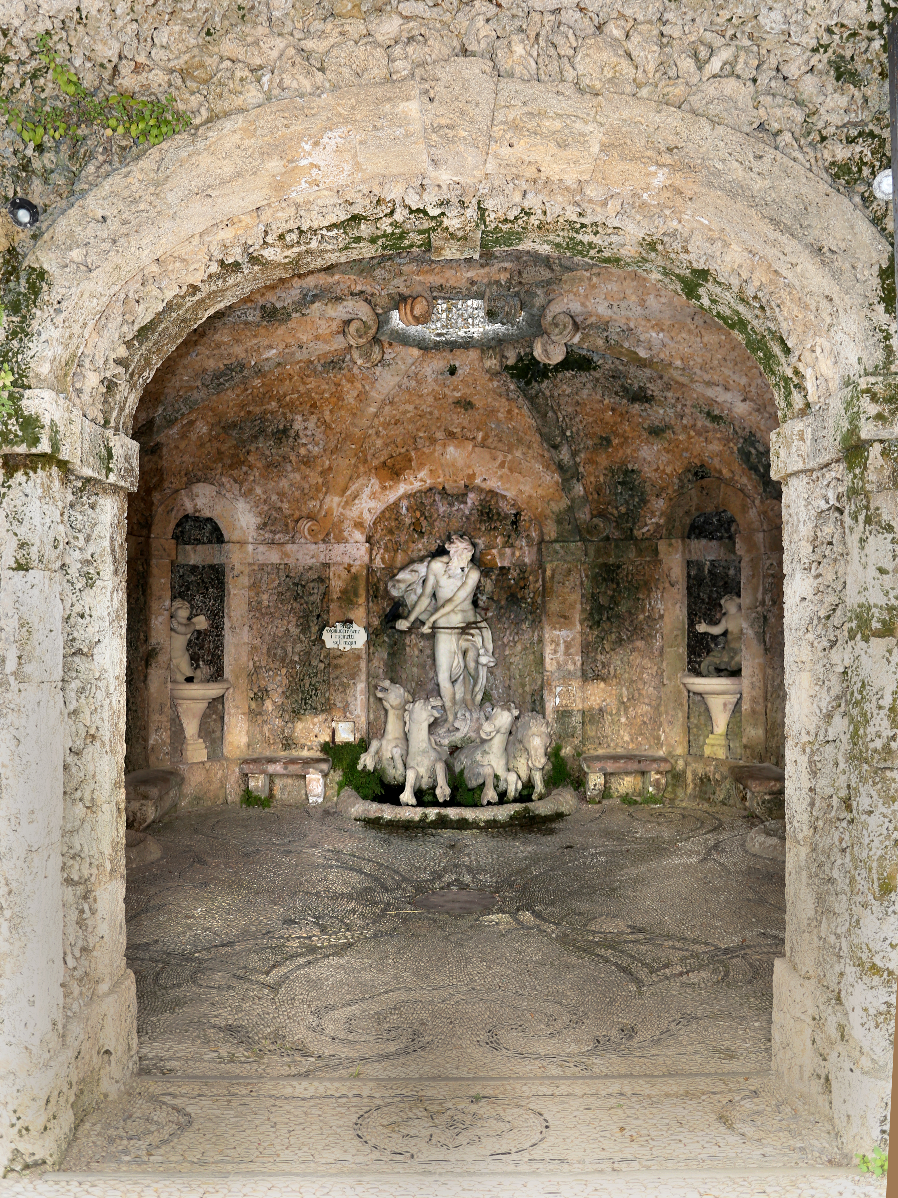 Giardino di Villa Garzoni - Grotto This is a photo of a monument which is part of cultural heritage of Italy.